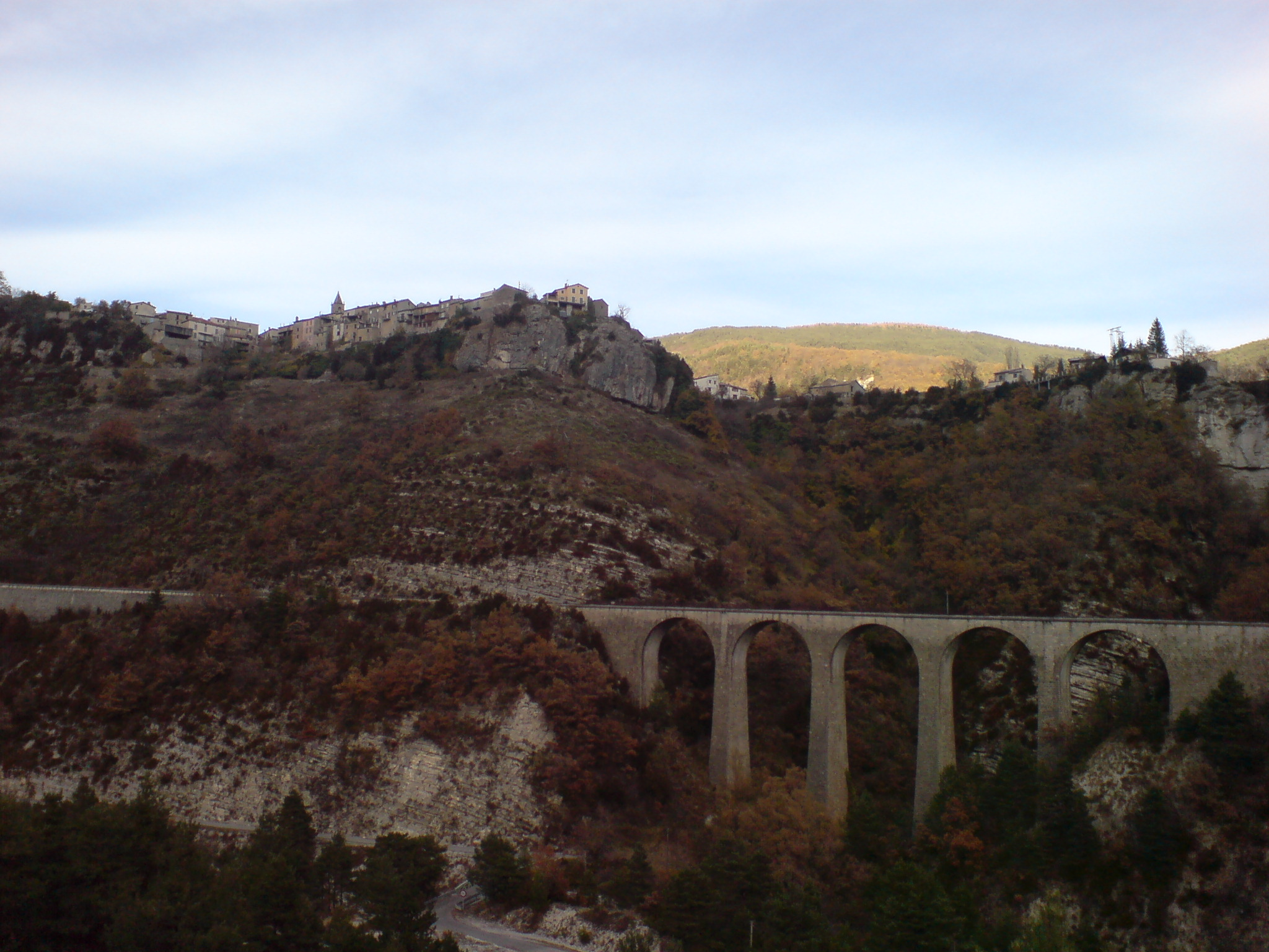 Le village perché de Méailles, dans les Alpes-de-Haute-Provence, et le viaduc des Guillaumasses, de la Ligne de Nice à Digne (celui au sud de la gare).